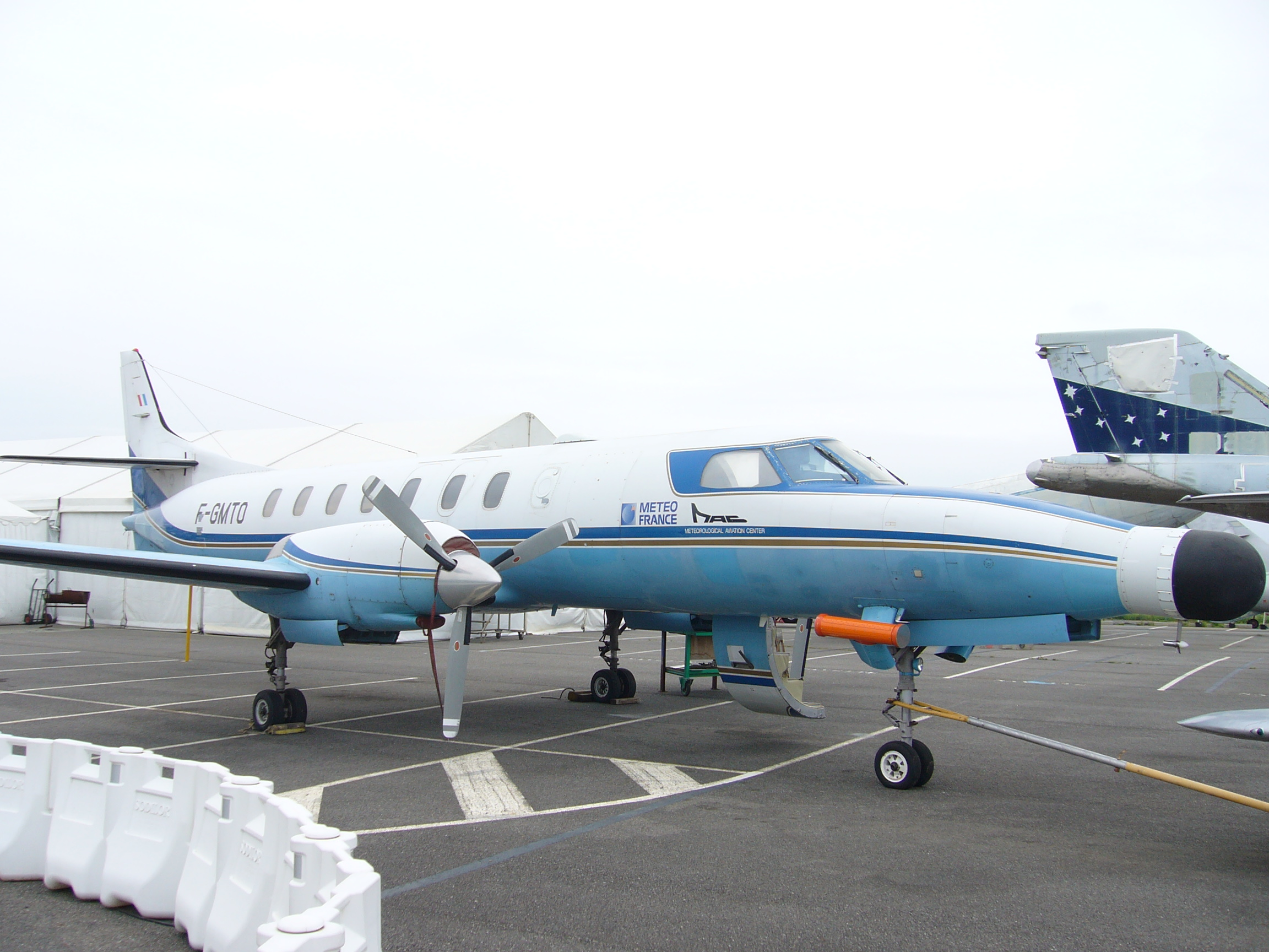 FAIRCHILD SA226-AT MERLIN IVA musée des ailes anciennes de Toulouse France